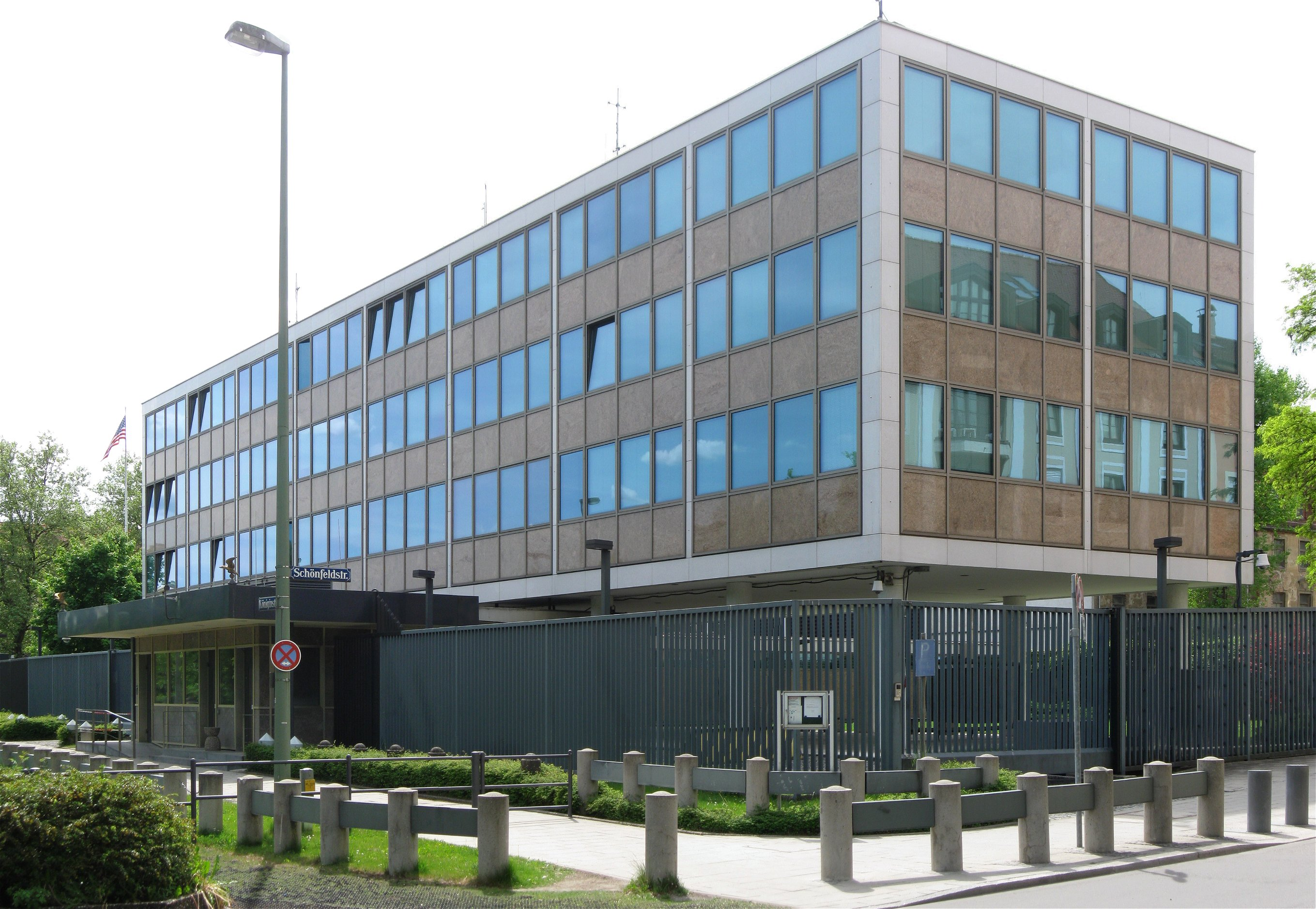 Königinstraße 5. Amerikanisches Generalkonsulat, Gruppe aus zwei frei und offen angeordneten Baukörpern, kubische Flachdachbauten in Stahlbetonskelettbauweise mit vorgehängten Fassaden, z. T. Natursteinverkleidung: Hauptgebäude, über offener geschosshoher Betonstützenreihe dreigeschossig und Pavillonbau, erdgeschossiger teils unter das Stützengeschoss des Haupthauses geschobener Baukörper, von Sep Ruf (überarbeiteter Entwurf der Architektengruppe Skidmore, Owings & Merill, New York), 1957/58, hohe Sicherheitsumzäunung, 1985; Brandmauerverkleidung des westlichen Nachbarhauses, Betonrahmengerüst mit schwarzen Betonlochsteinen, bauzeitlich.